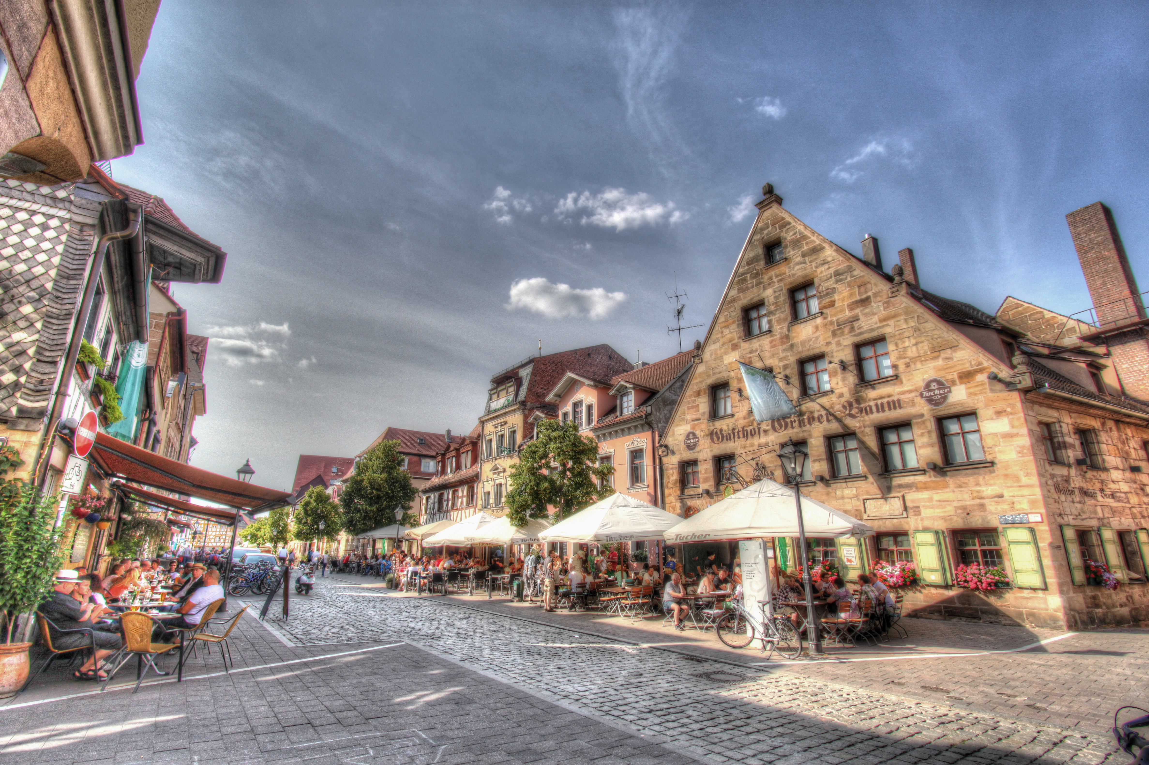 Gustavstraße in Fürth, HDRI Aufnahme